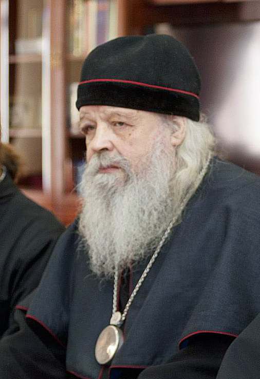 епископ Евмений (Михеев) на встрече с президентом Приднестровья